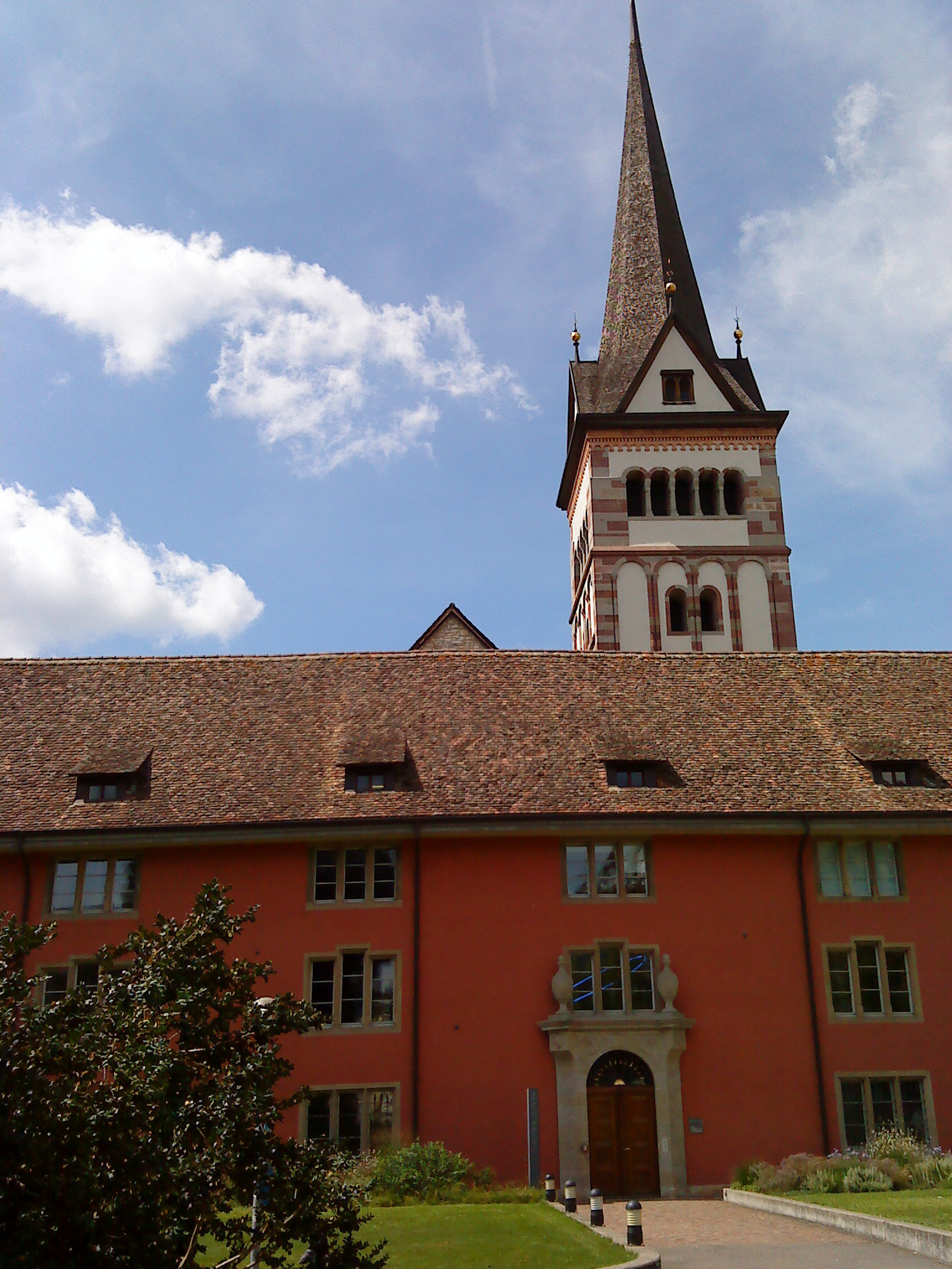 Münsterturm Allerheiligen mit Stadtbibliothek in Schaffhausen, Schweiz.